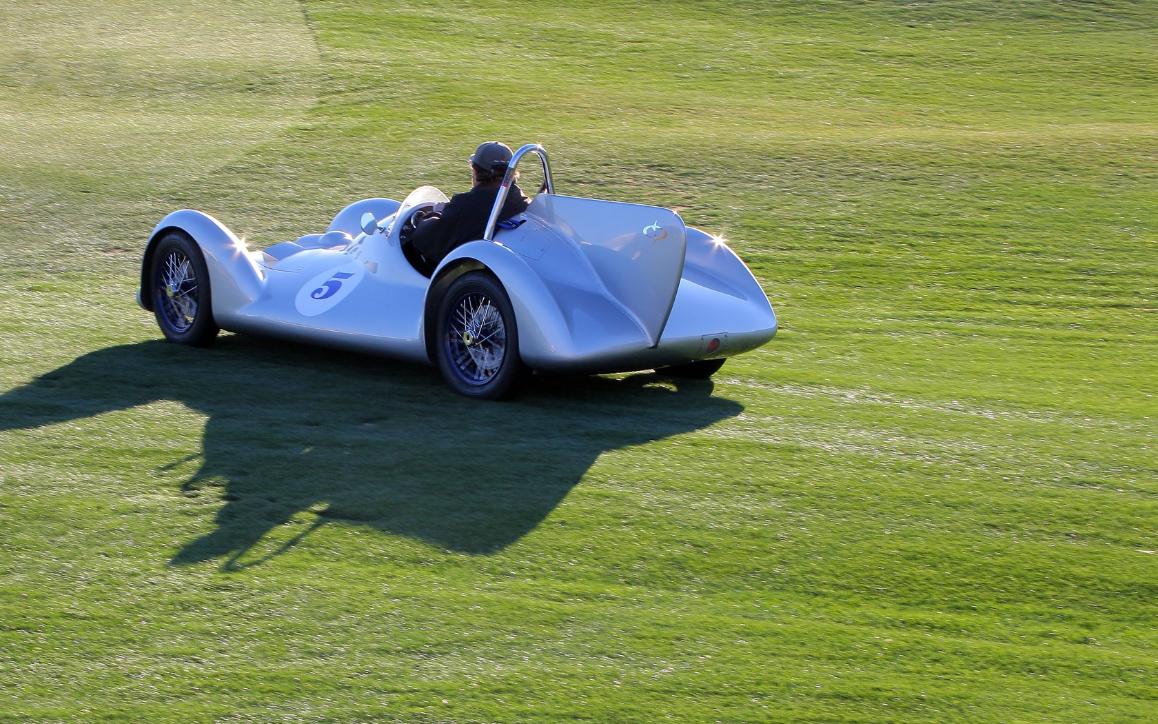 2011 Desert Classic, La Quinta, CA